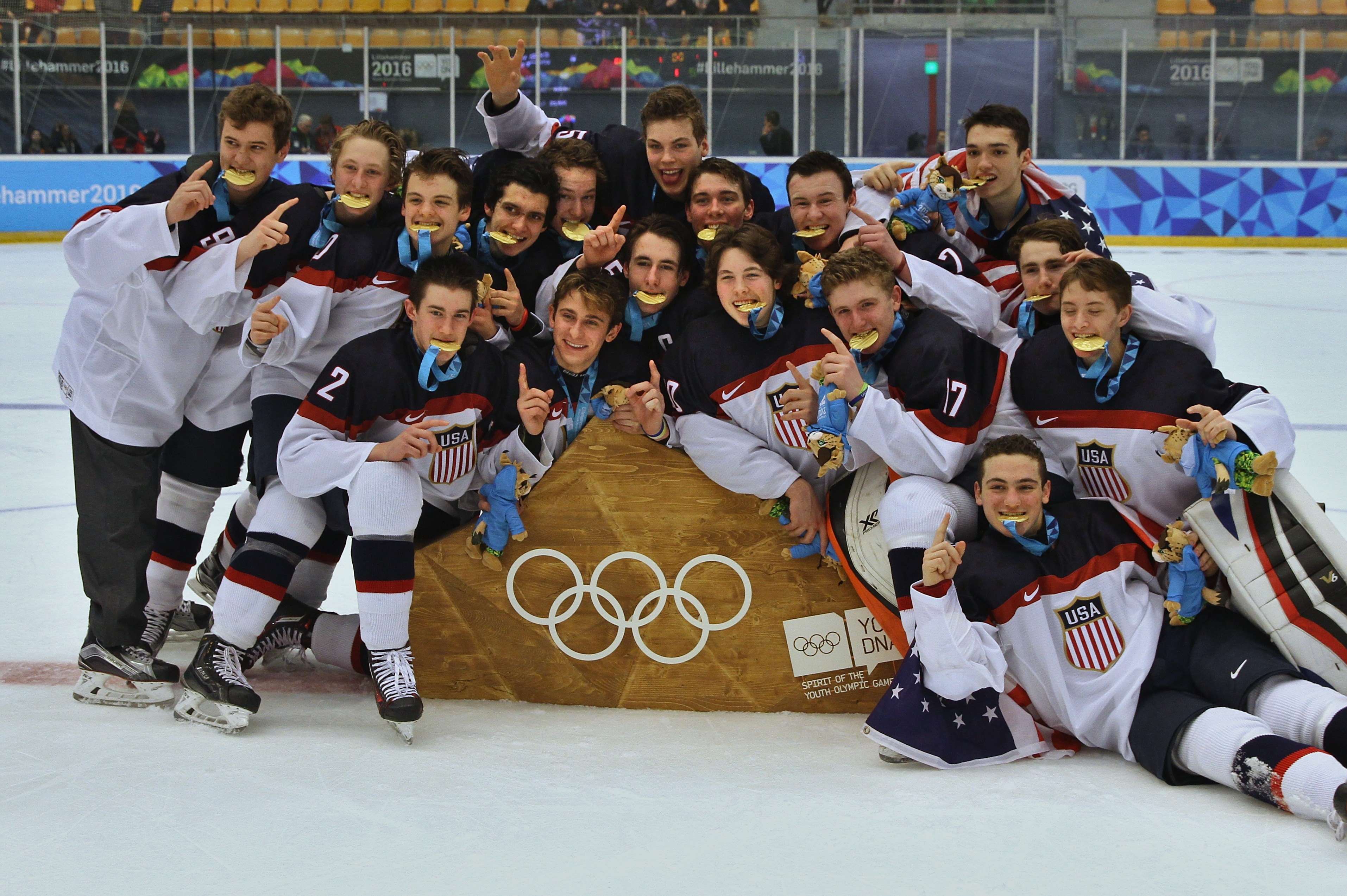 Lillehammer 2016 Finale Hockey hommes